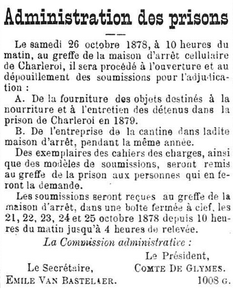 Adjudication à la prison de Charleroi - Gazette de Charleroi - 13 octobre 1878